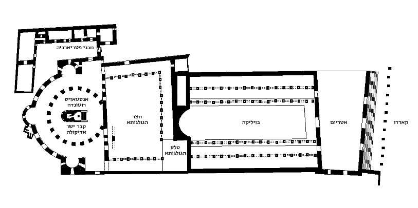 תרשים של כנסיית הקבר במאה ה-4 לספירה